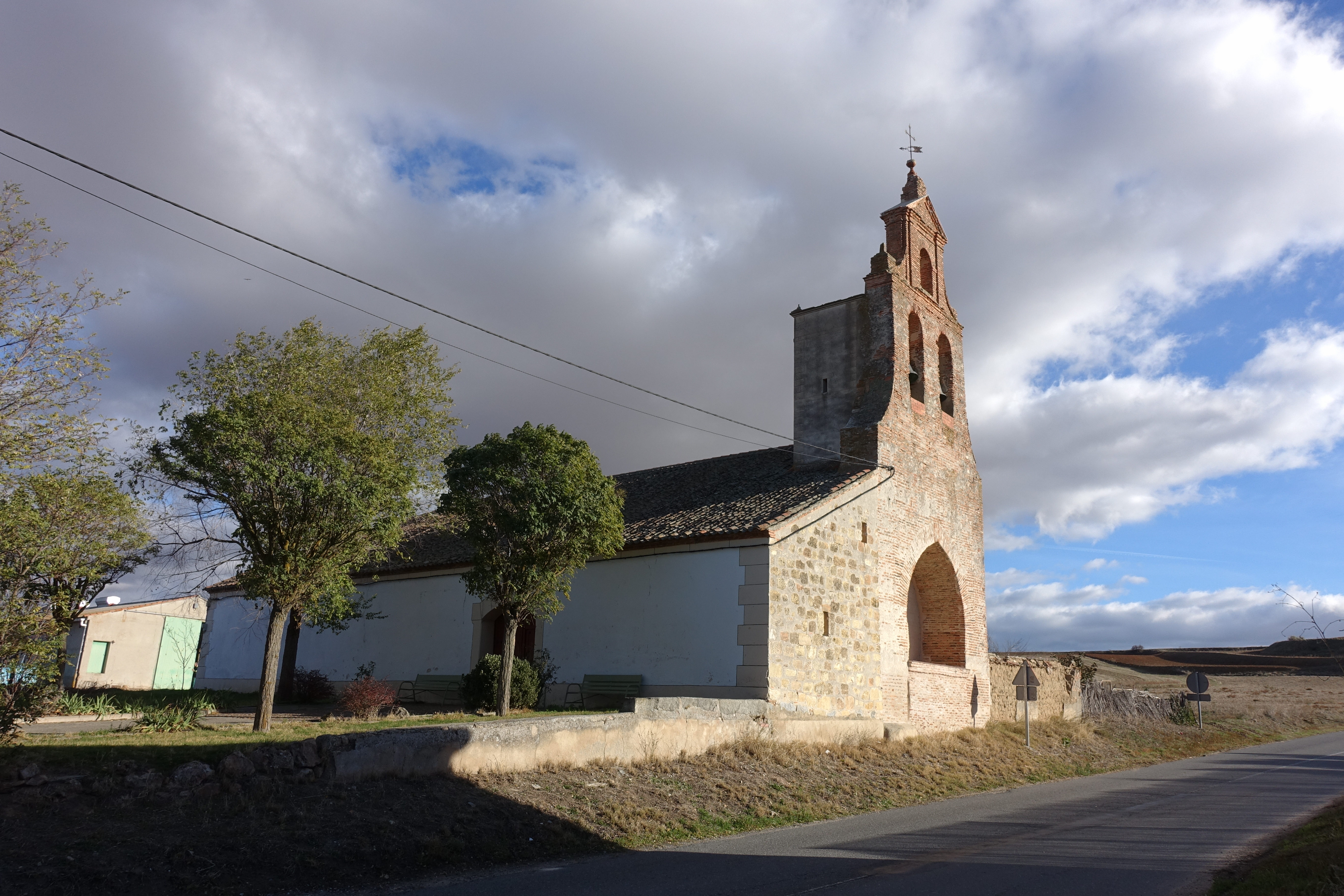 Iglesia de San Juan Bautista, en Añe (Segovia, España).